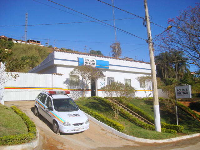 Destacamento de Policia em Vermelho Novo